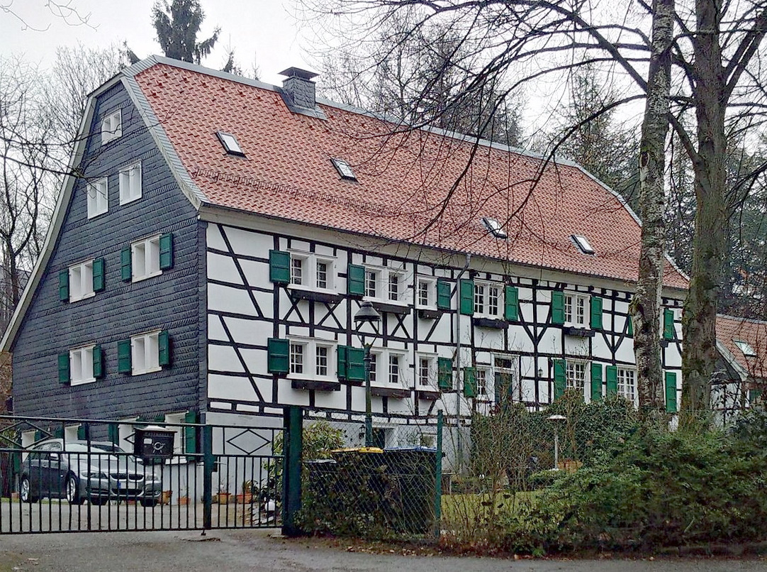 Gutshaus Untengönrath in Solingen, aufgenommen im Winter 2016/2017